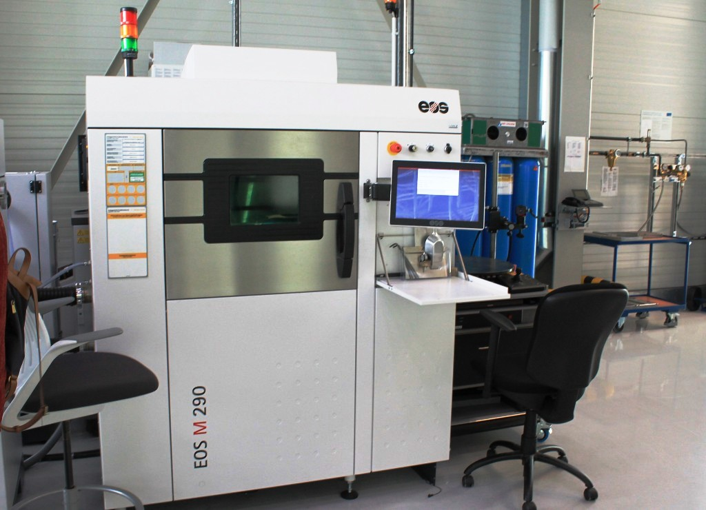 ZAL Finkenwerder, Blick auf einen 3-D-Drucker